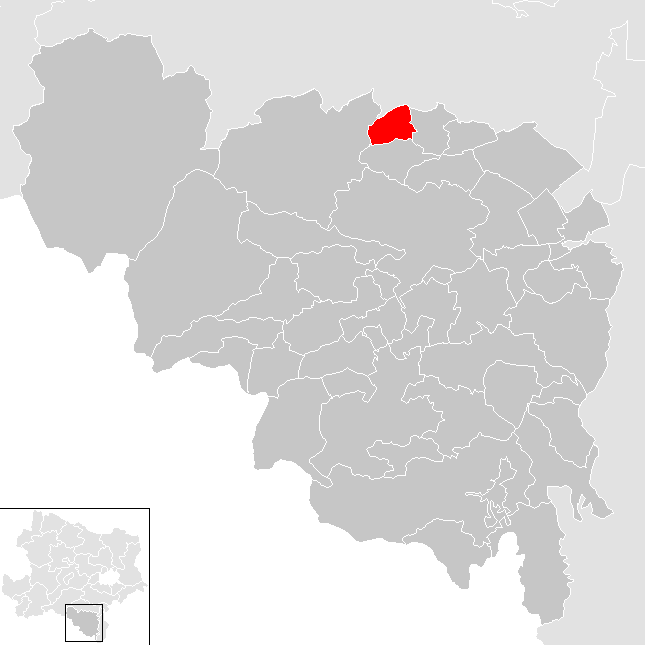 Bezirk Neunkirchen